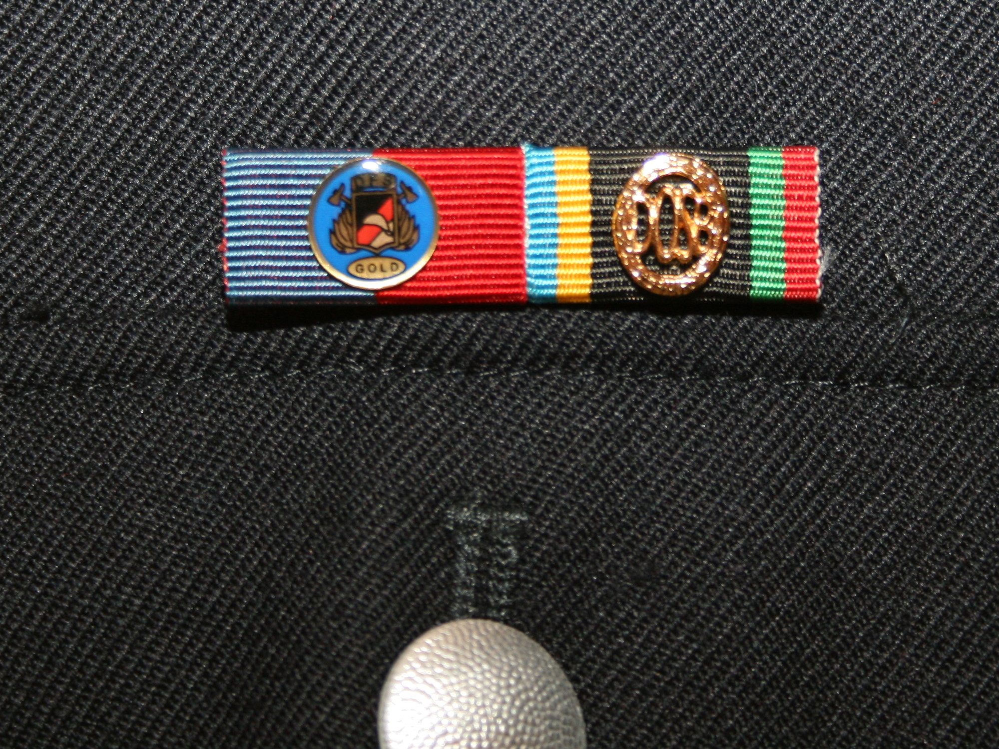 Bandschnallen des DFFA in Gold (Deutsches Feuerwehr Fitness-Abzeichen, links) und des Deutschen Sportabzeichens in Gold (rechts) an einer Feuerwehruniform, 2013